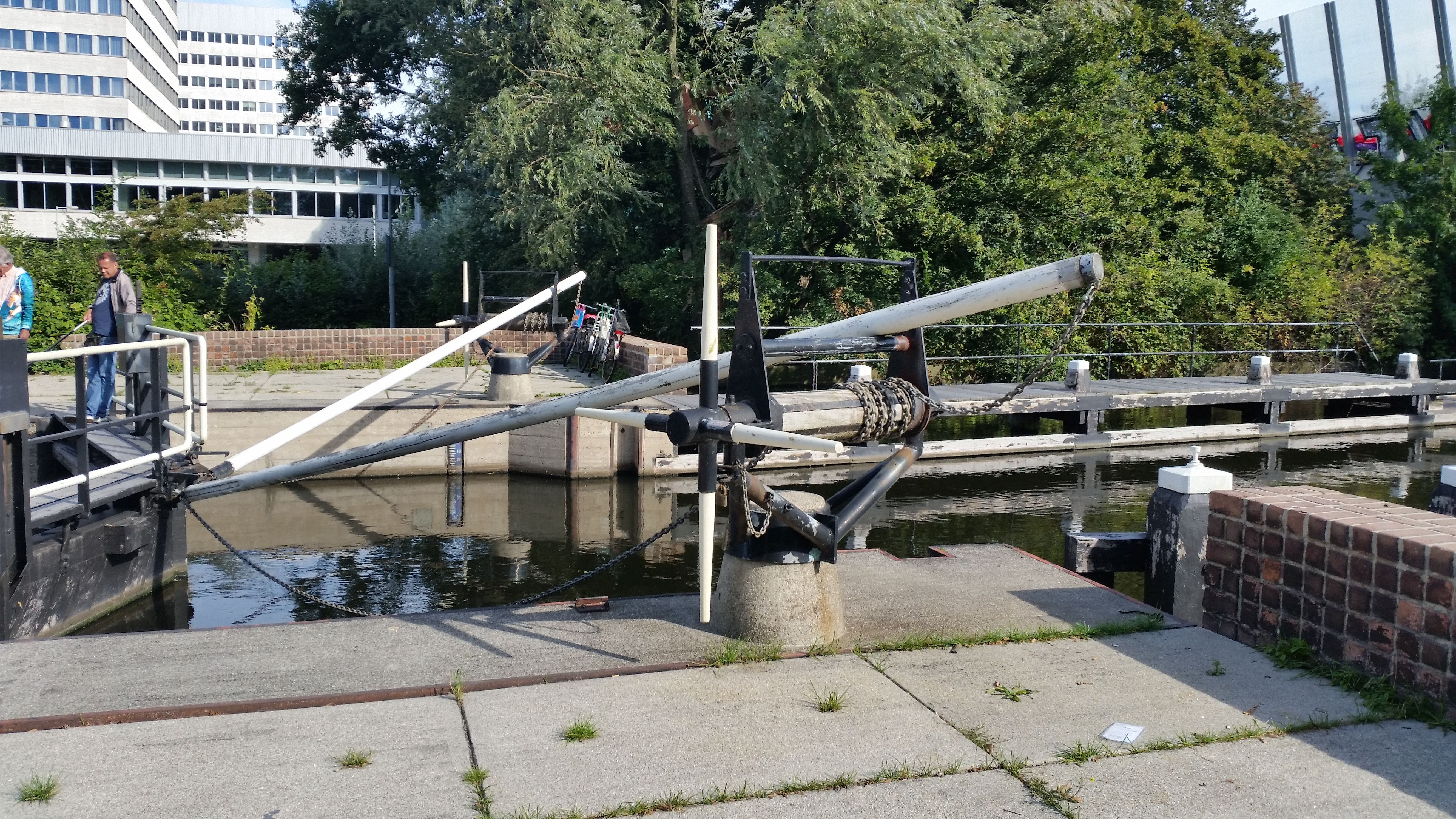 Westlandgrachtschutsluis, bedieningsmechaniek Westlandgracht